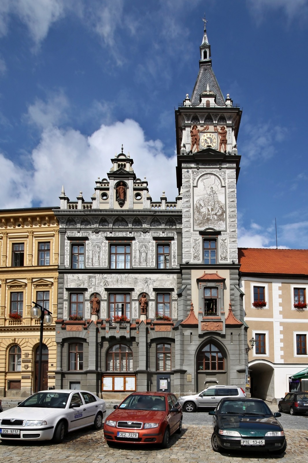 Novorenesanční radnice z roku 1903 stojí na místě původních dvou městských domů. Stavitelem radnice byl Rudolf Zobel z Prachatic, sgrafitovou výzdobu provedl akademický malíř Jan Viertelberger, sochy pocházejí z dílny vídeňského mistra Jiřího Leiska.